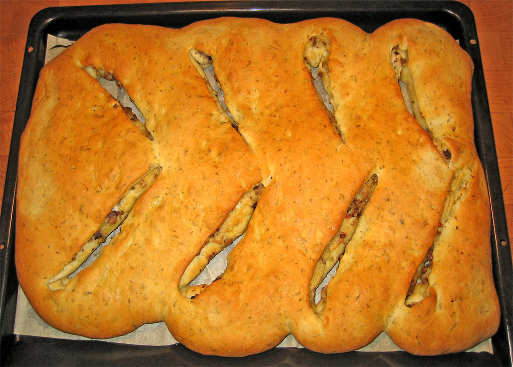 Fougasse